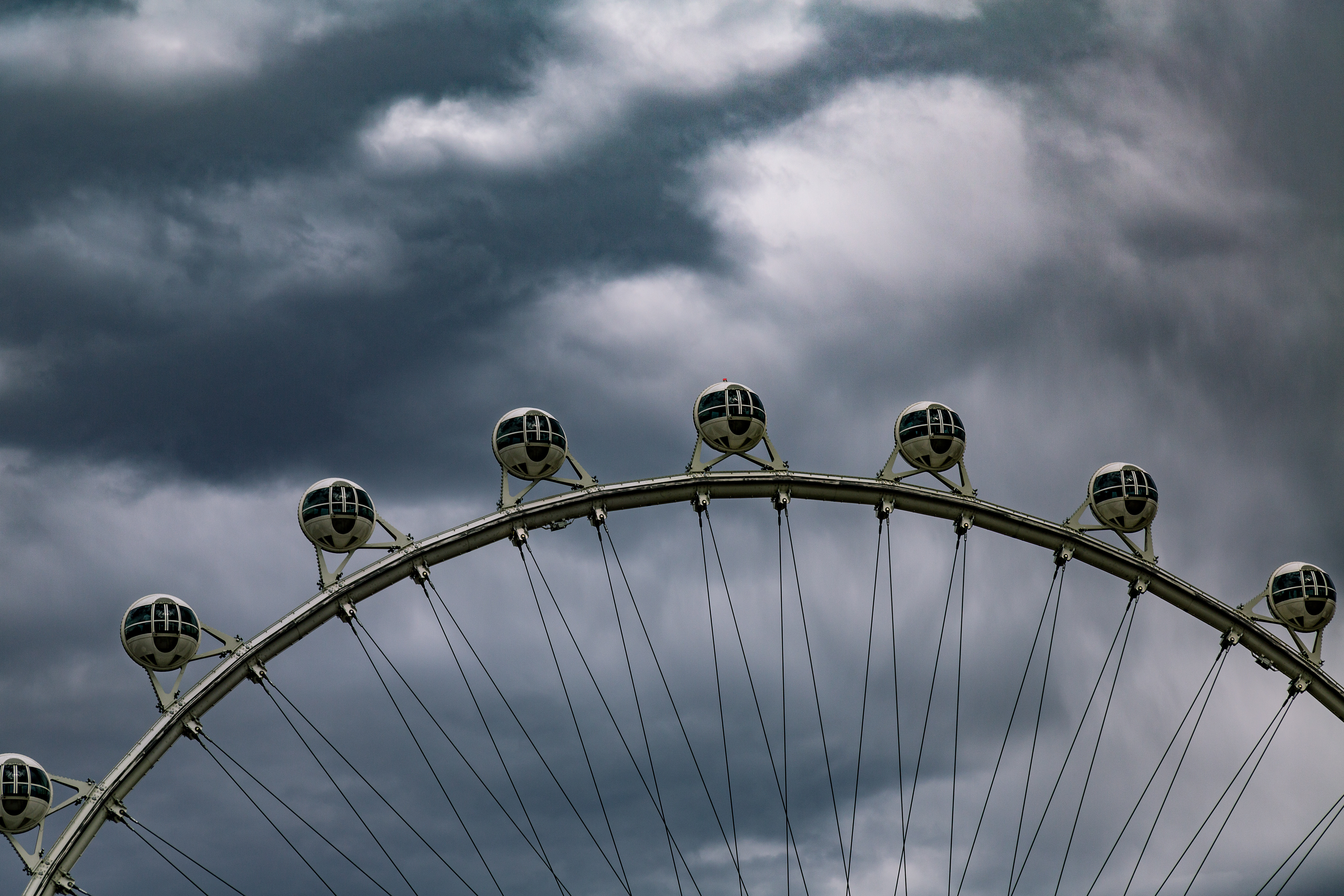 Ferris wheel in Las Vegas, Nevada